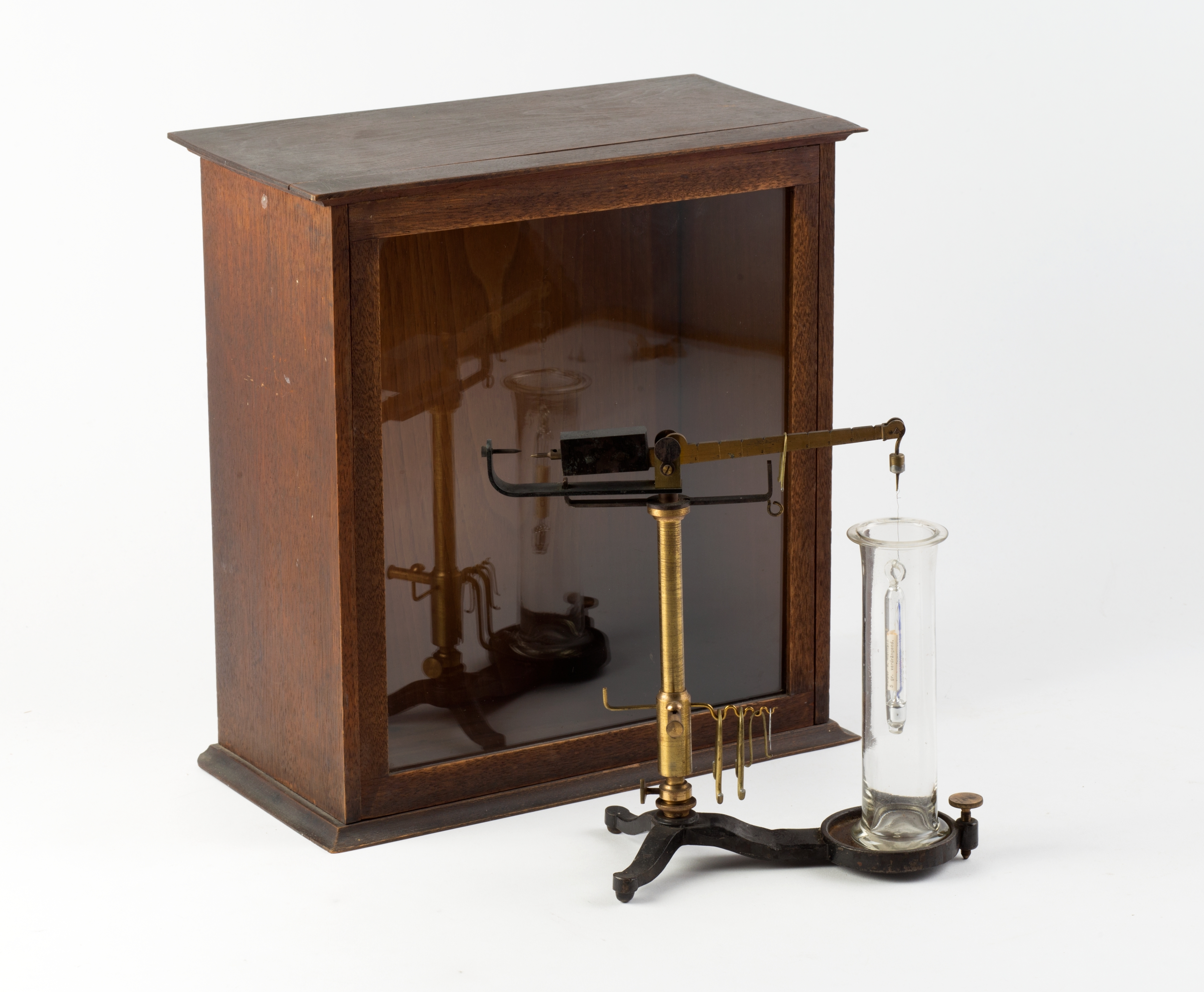 Mohr-Westphals vekt i kasse av tre og klart glass på Norsk Farmasihistorisk Museum.